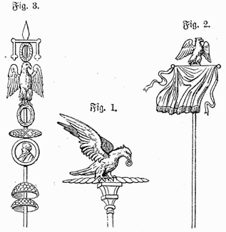 Abbildung aus Meyers Konversationslexikon 1888 - Adler der römischen Legionen